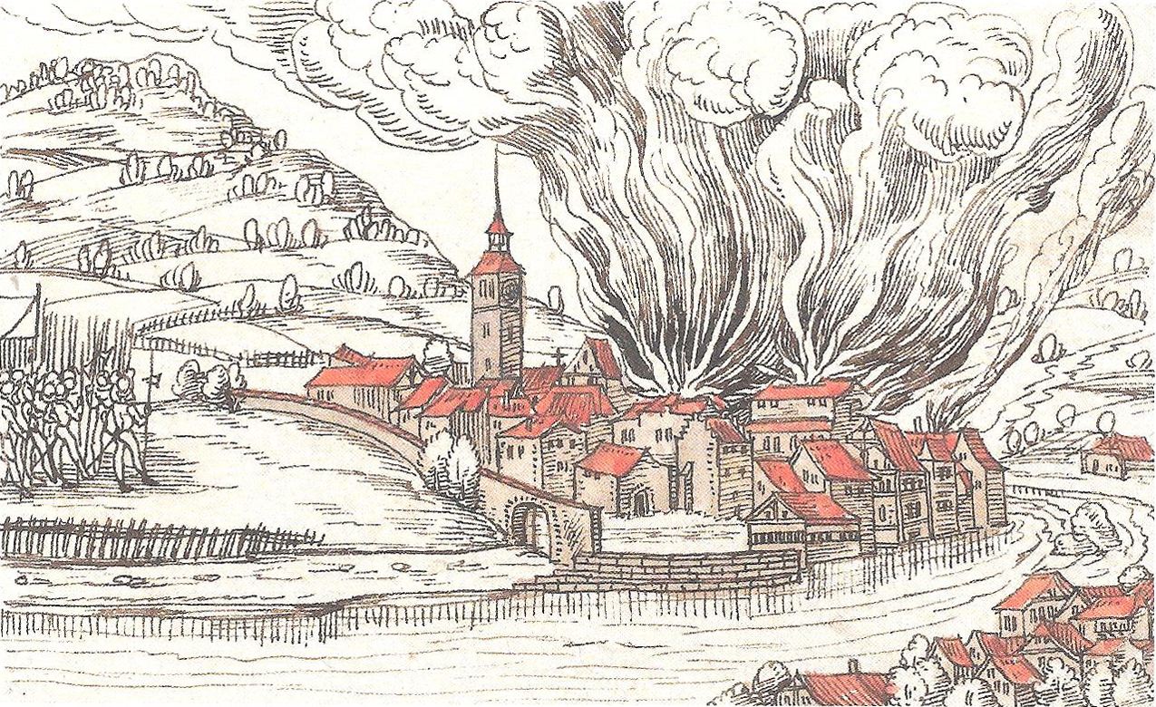 Brand der Bäder von Baden am 22. Oktober 1444 während des Alten Zürichkriegs. Abbildung in der Schweizer Chronik von Christoph Silberysen (1576). Originalbeschriftung: "Wie die von Zürich die grossen Beder zuo Bade verbrantend"